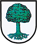 Herb Boniowic (gmina Zbrosławice, powiat tarnogórski, województwo śląskie, Polska)